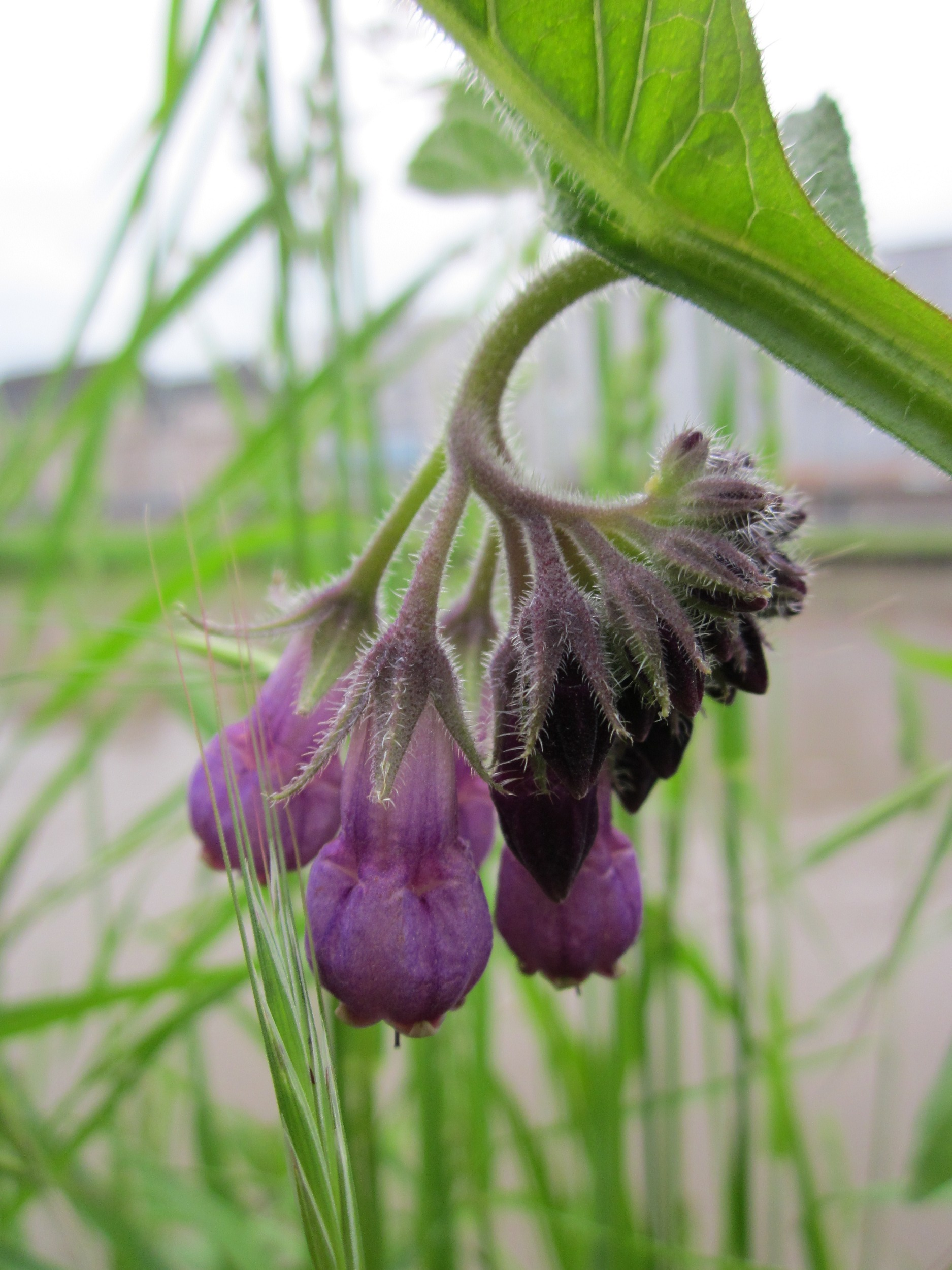 Echter Beinwell (Symphytum officinale) an der Saar in Saarbrücken